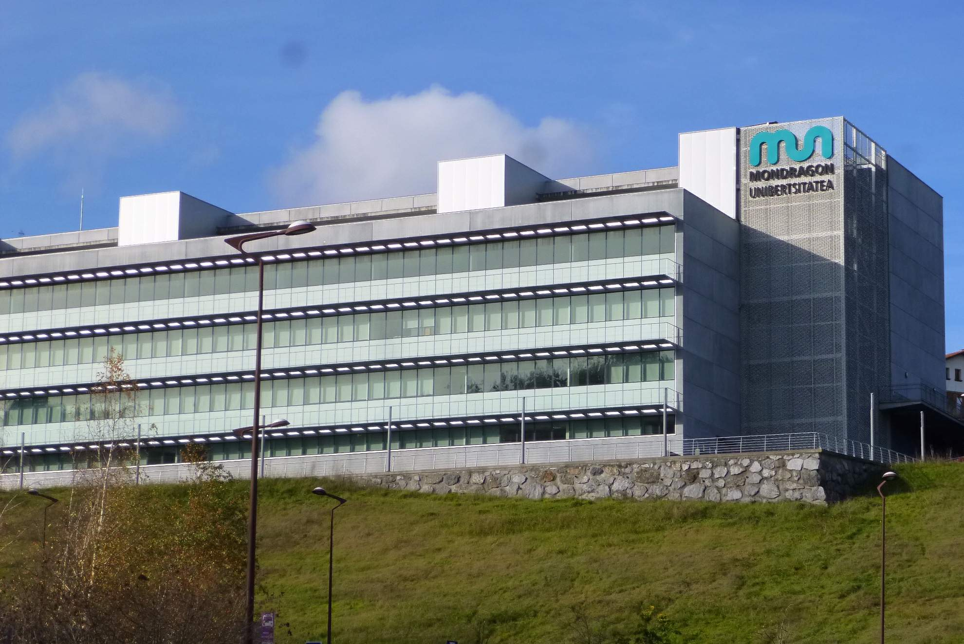 Escuela Politécnica Superior (Goi Eskola Politeknikoa) de la Universidad de Mondragón (Mondragon Unibertsitatea), Campus de Mondragón, Sede Garaia. En Arrasate/Mondragón, Gipuzkoa.